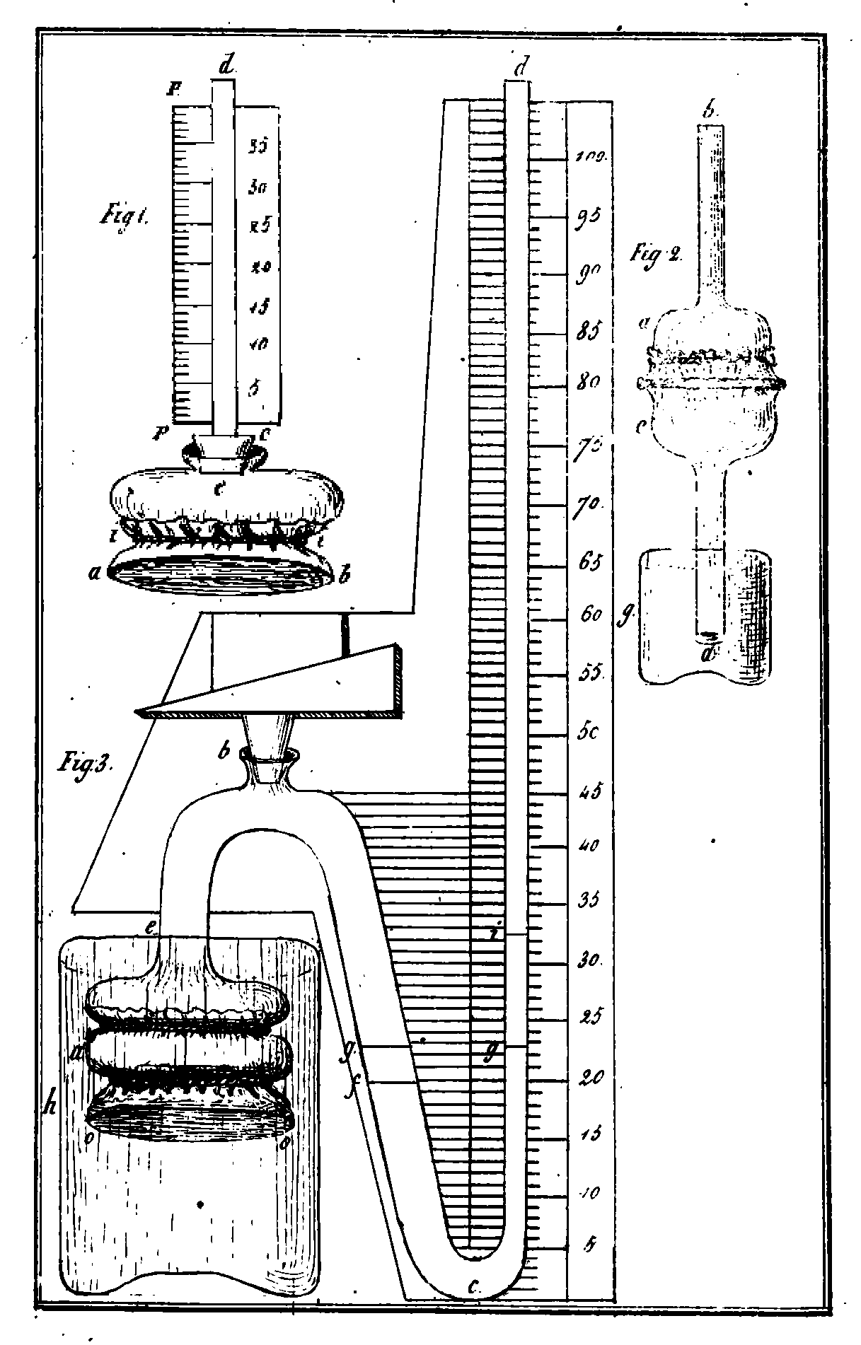 Darstellung des von Henri Dutrochet entwickelten Endosmosmeters aus Nouvelles recherches sur l'endosmose et l'exosmose, Paris, 1828.